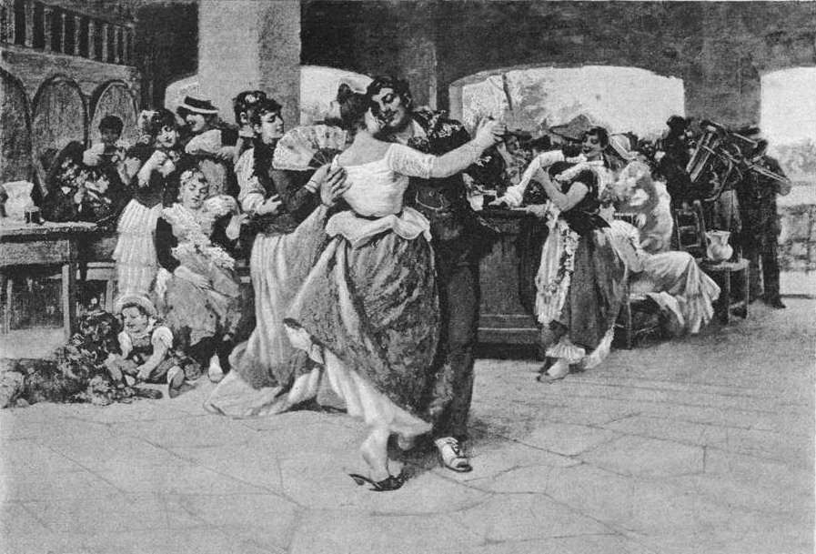 Die Unermüdlichen